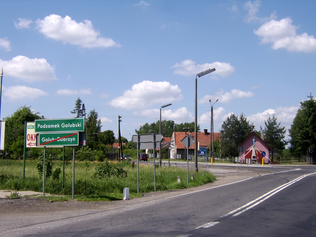 Wieś Podzamek Golubski